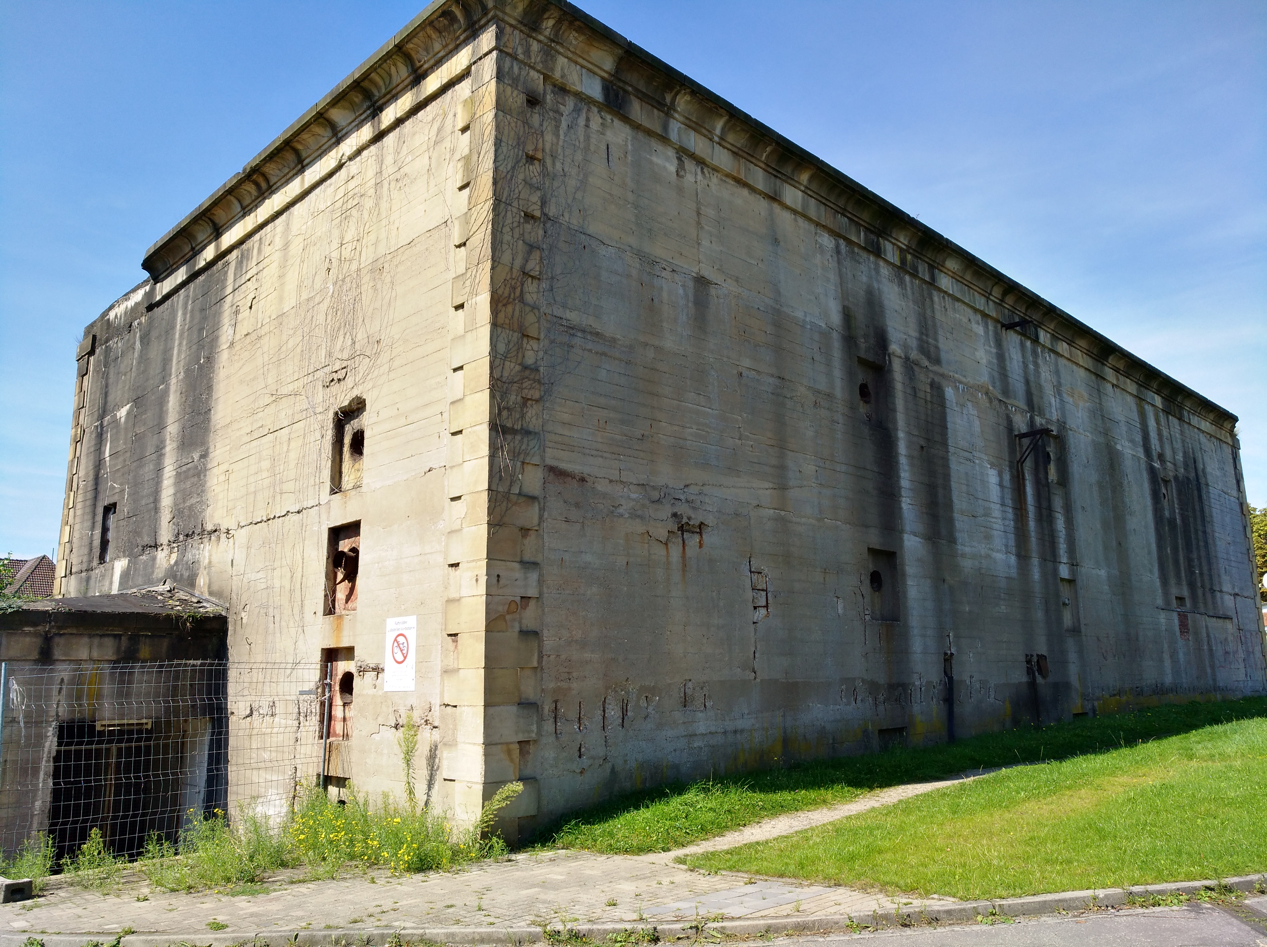 Der Hochbunker am Hauptbahnhof Osnabrück.